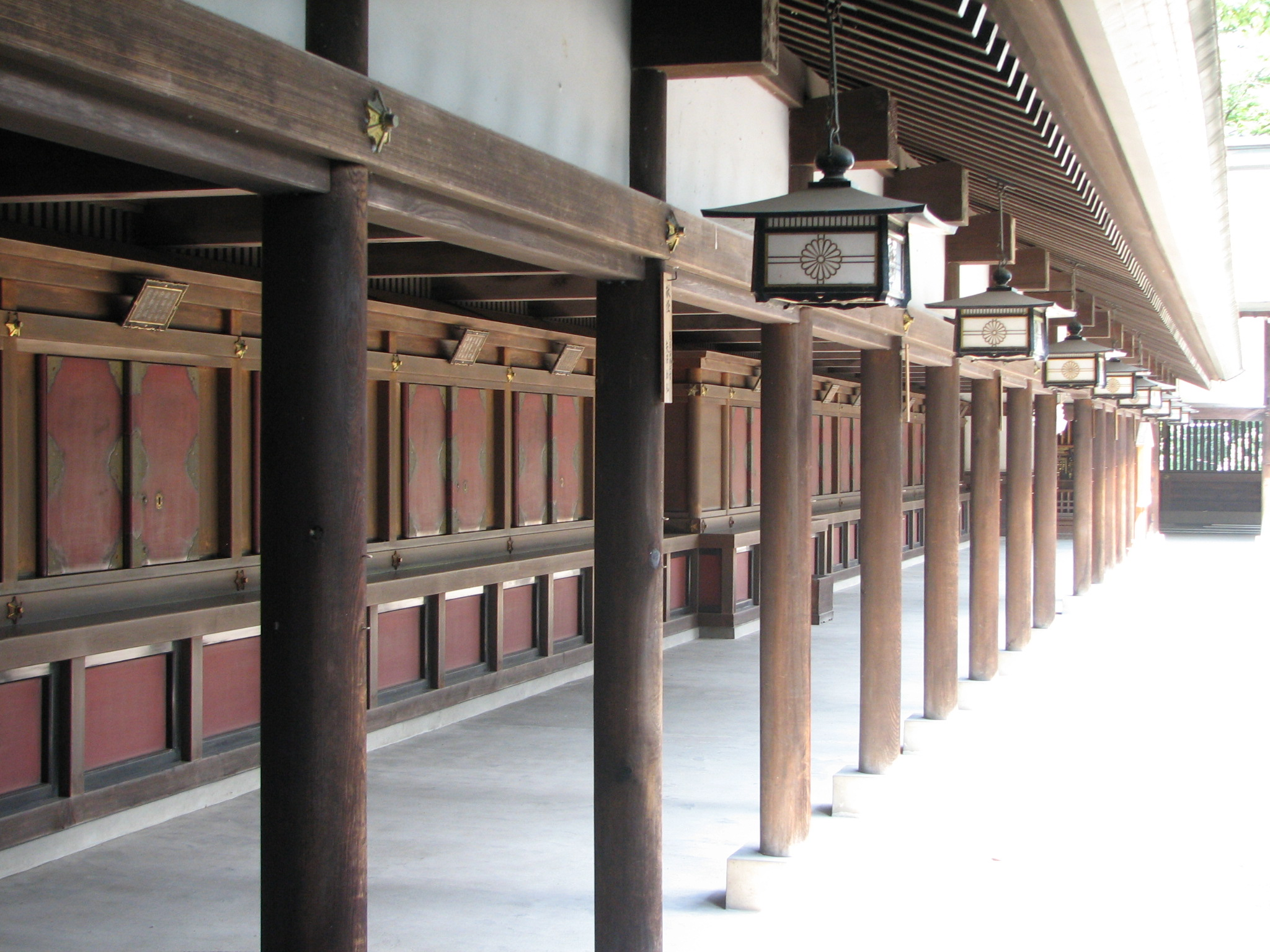 Tenjin-chigi-sha in Chichibu-jinja, Chichibu, Saitama, Japan 秩父神社天神地祇社（埼玉県秩父市）